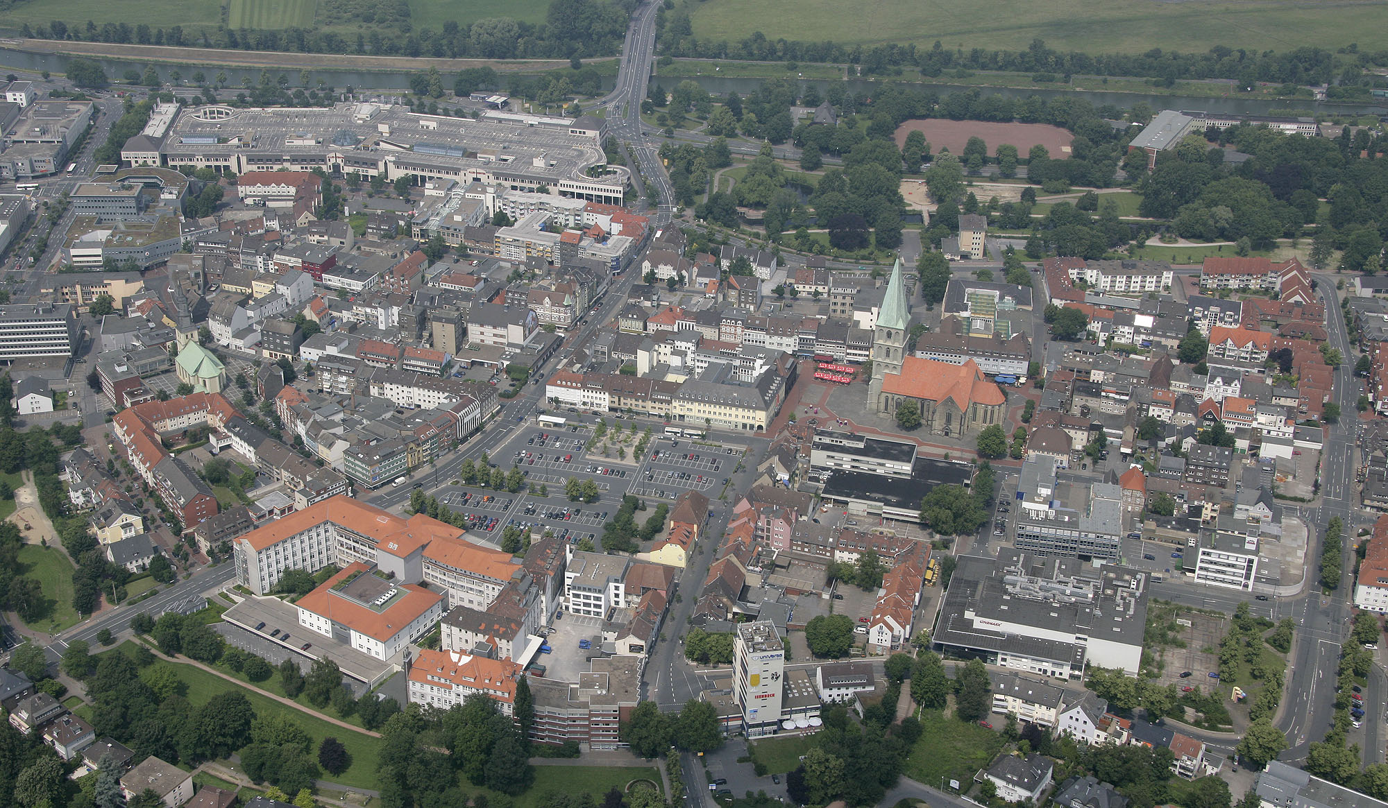 Luftbildaufnahme Hamm